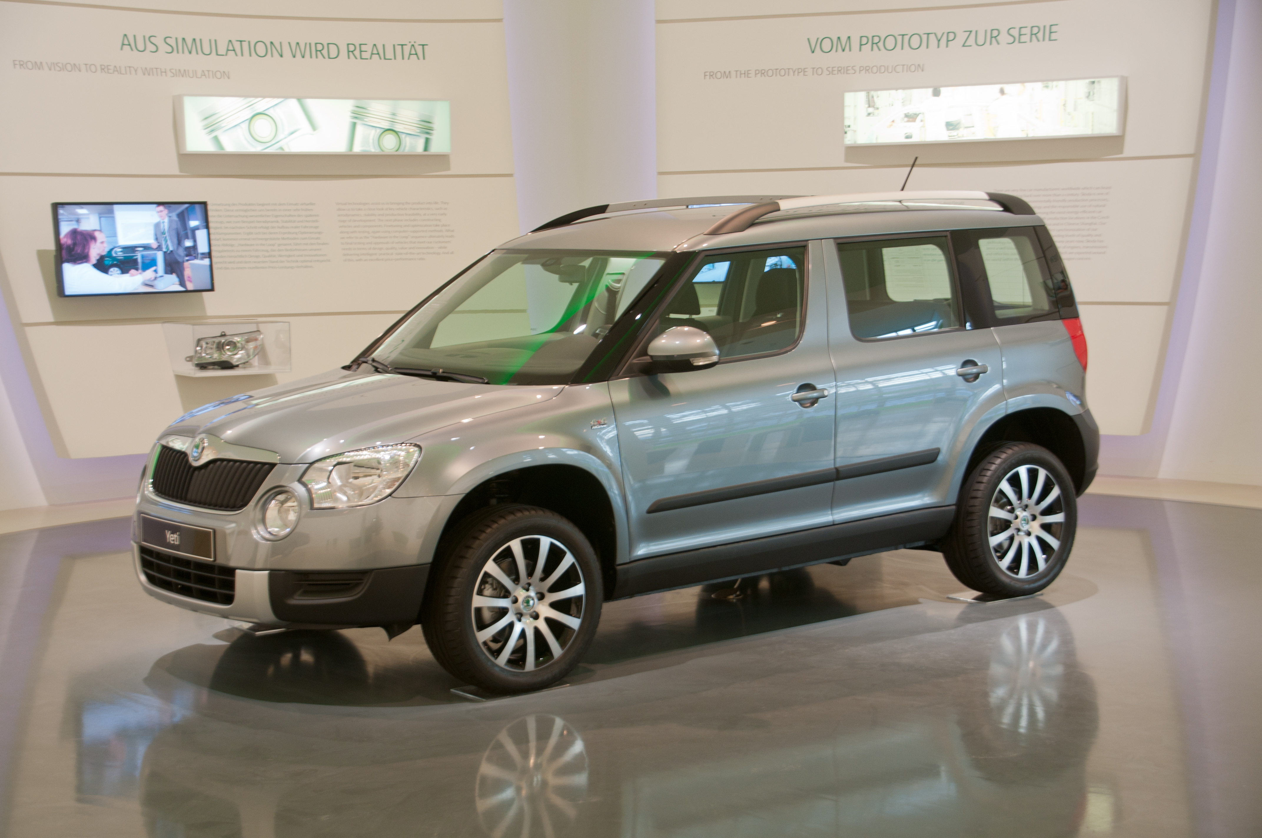 Autostadt Wolfsburg